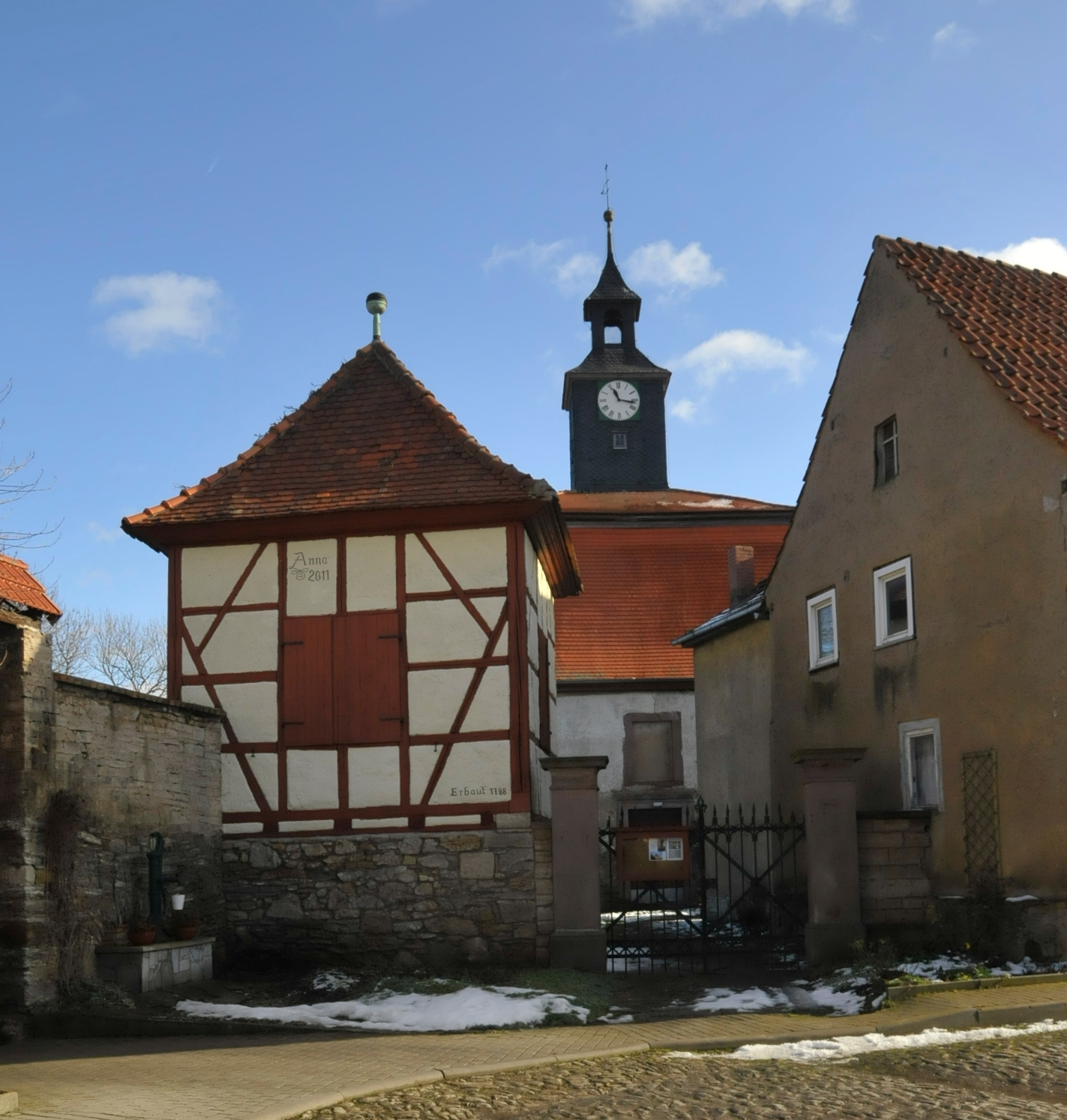 Waltersdorf (Weißensee) Dorfkirche St. Salvator